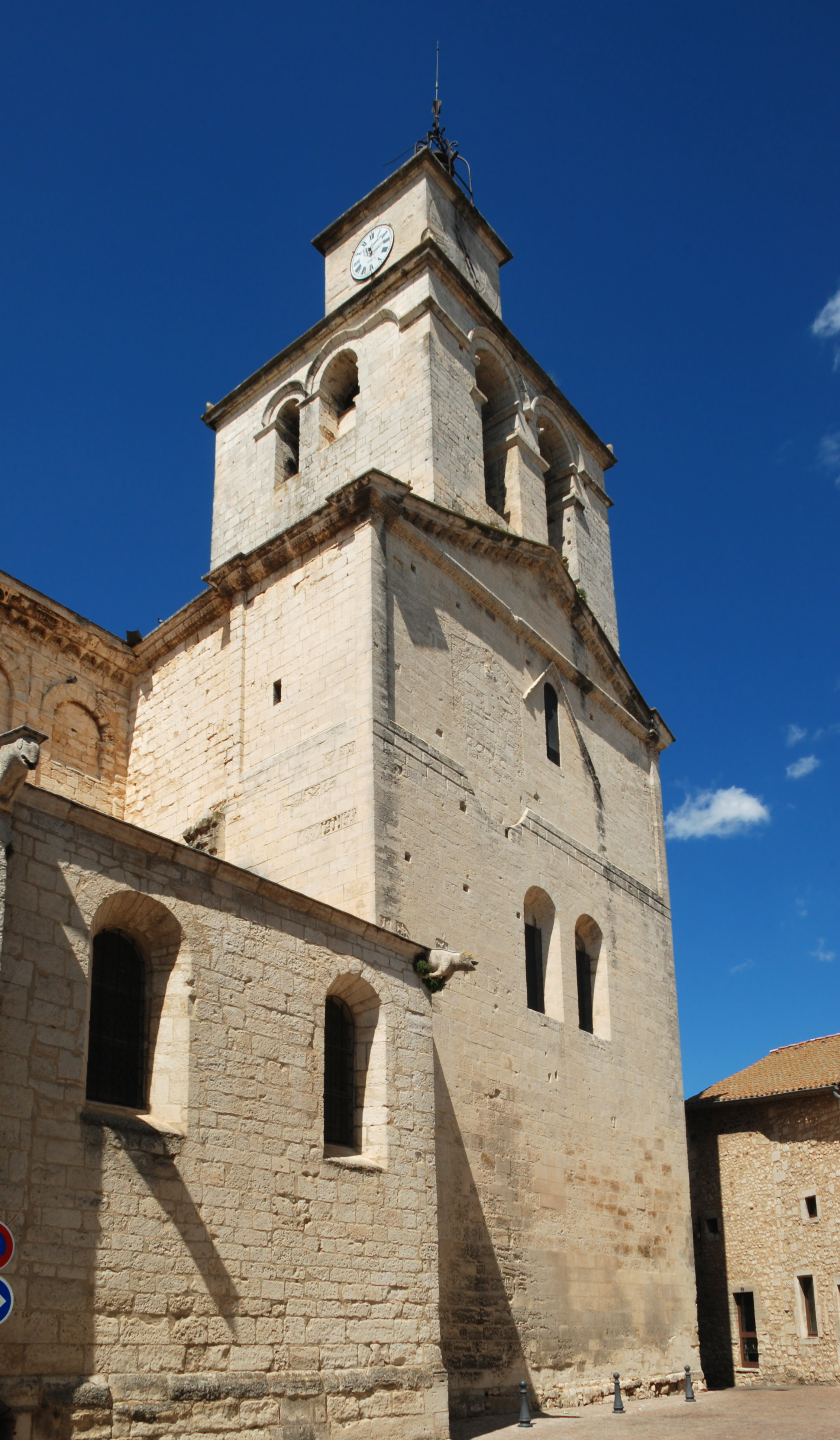 Cathédrale Notre-Dame de Saint-Paul-Trois-Châteaux